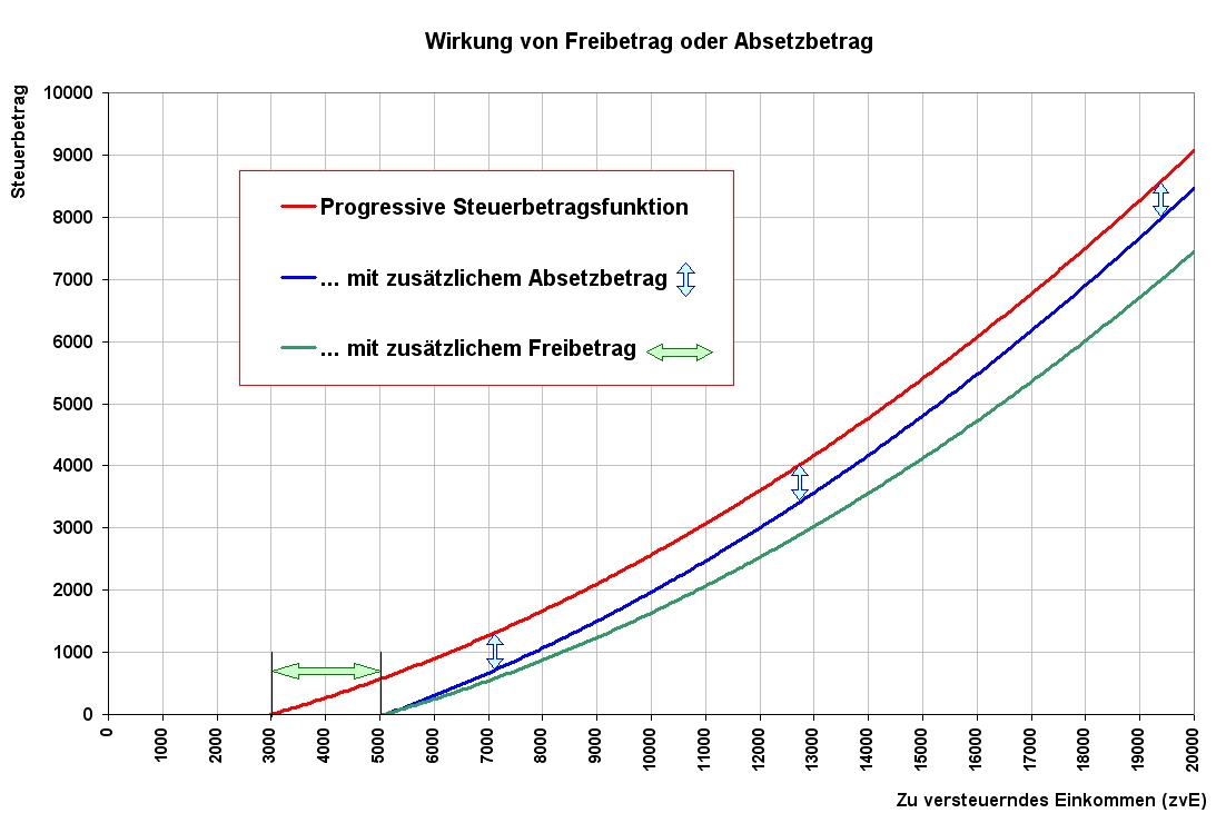 Wirkung eines zusätzlichen Absetzbetrages (Steuerermäßigung) oder eines zusätzlichen Freibetrages auf den Steuerbetrag bei einem progressiven Tarif (allgemeines Beispiel)